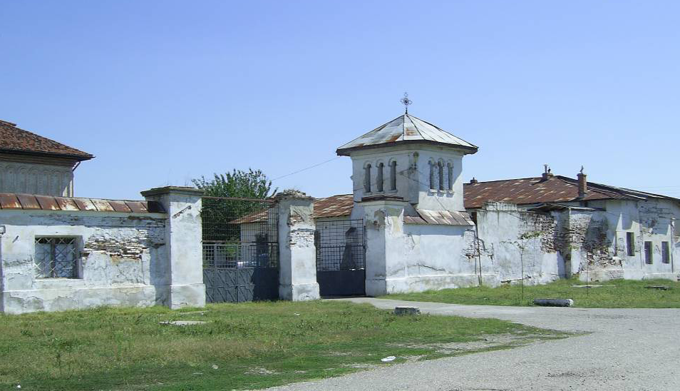 2010 - Mănăstirea Plătăreşti înainte de renovare - aspect exterior 05